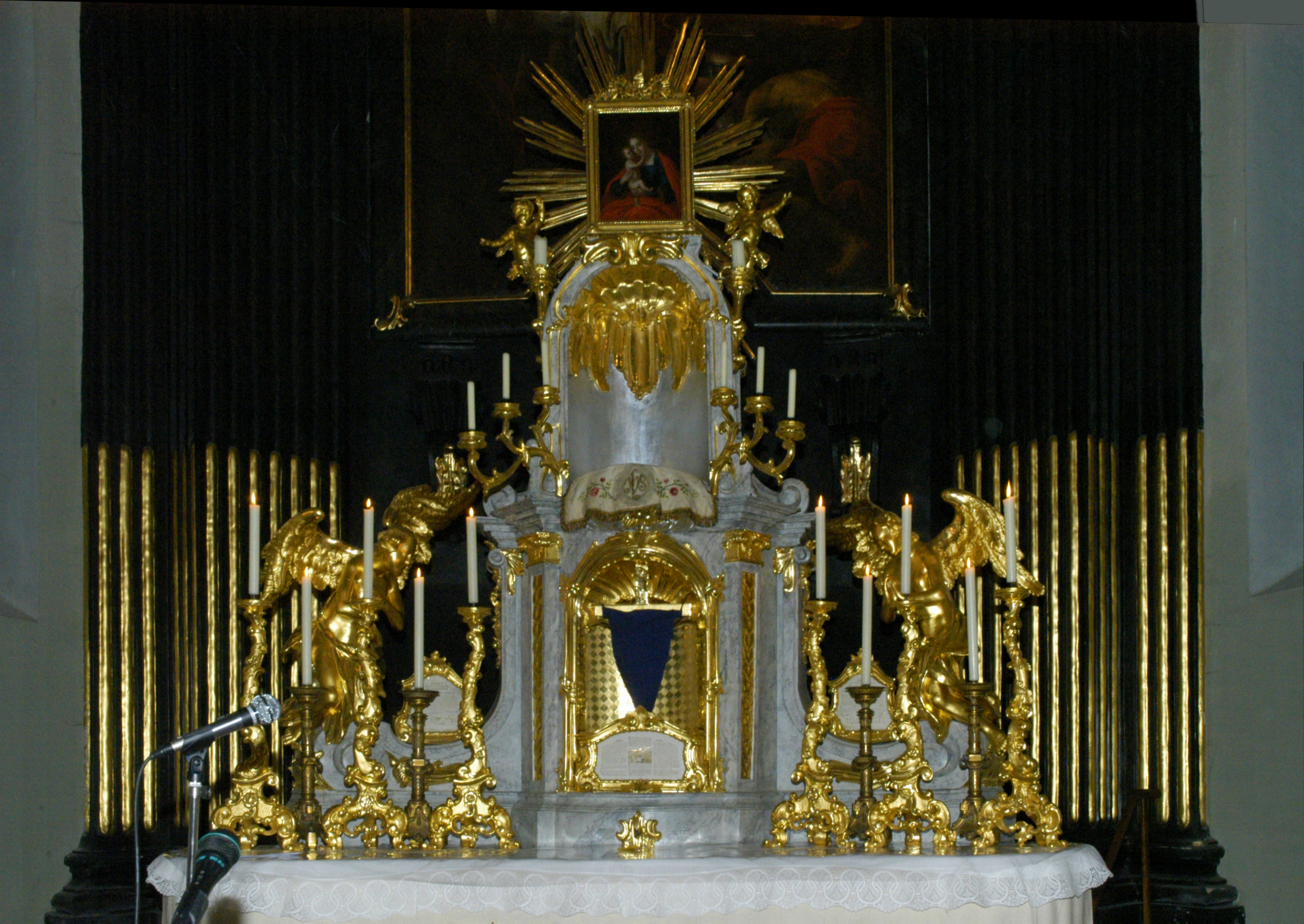 Hochaltar der katholischen Pfarrkirche heiliger Veit In Maissau